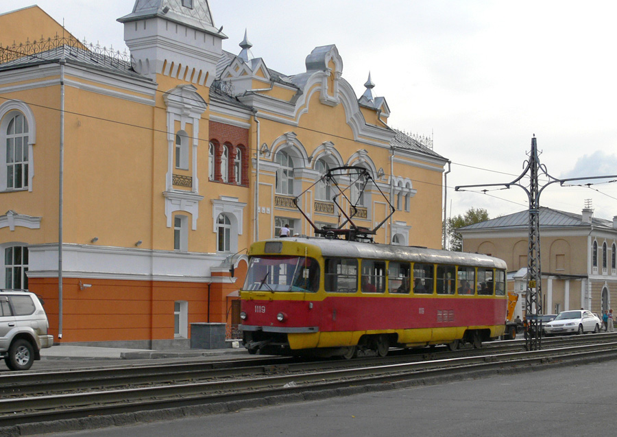 Tram in Barnaul